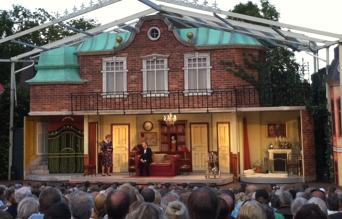 Eva Rydberg och Johan Ulveson på scen under föreställningen "Gröna Hissen", sommaren 2010.